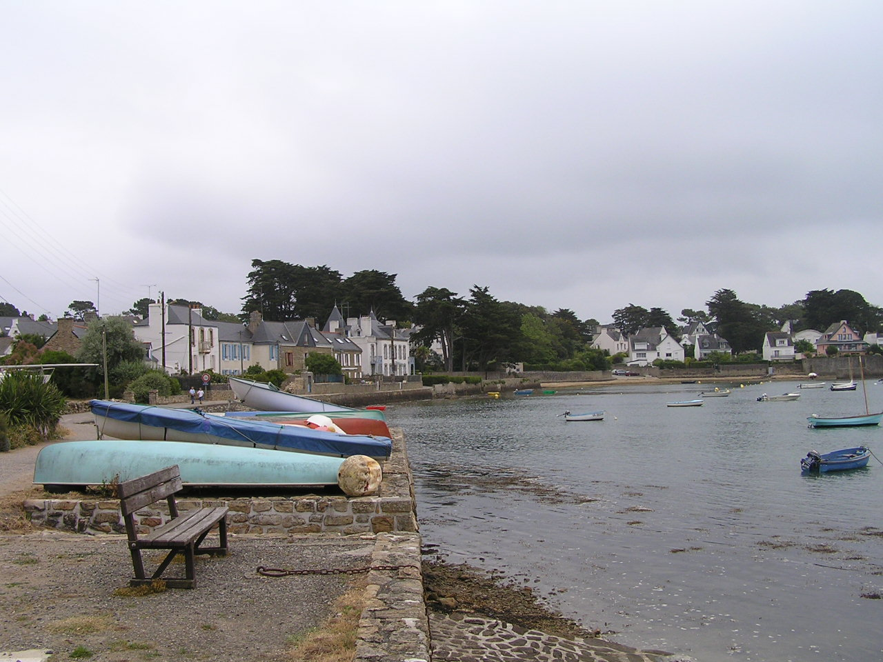 Port de Larmor-Baden, département du Morbihan, France.